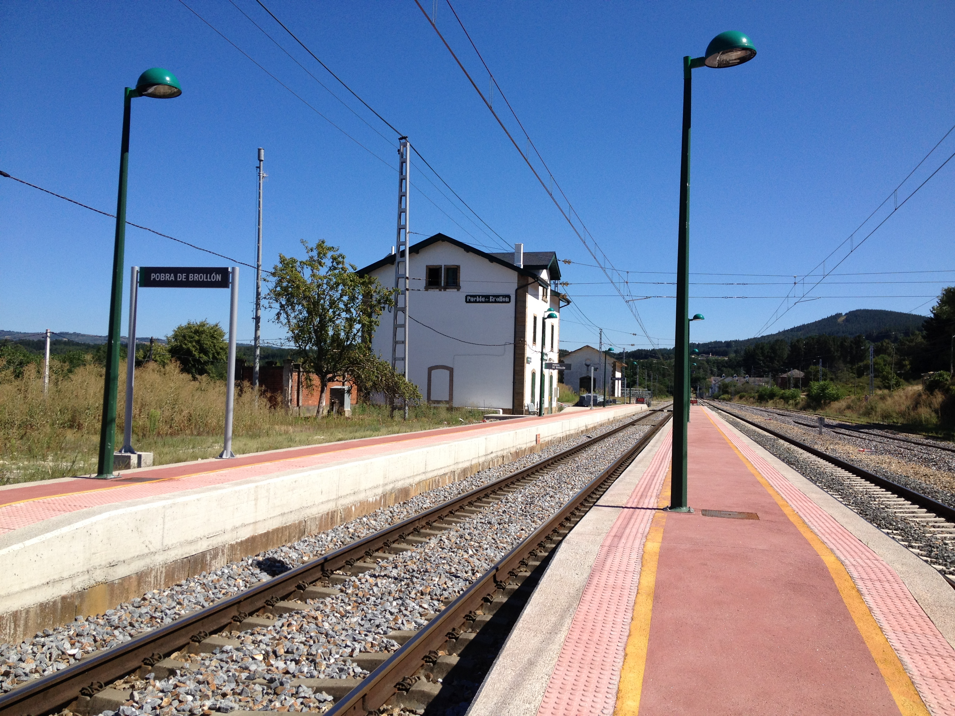 Estación de ferrocarril de A Pobra do Brollón (provincia de Lugo).